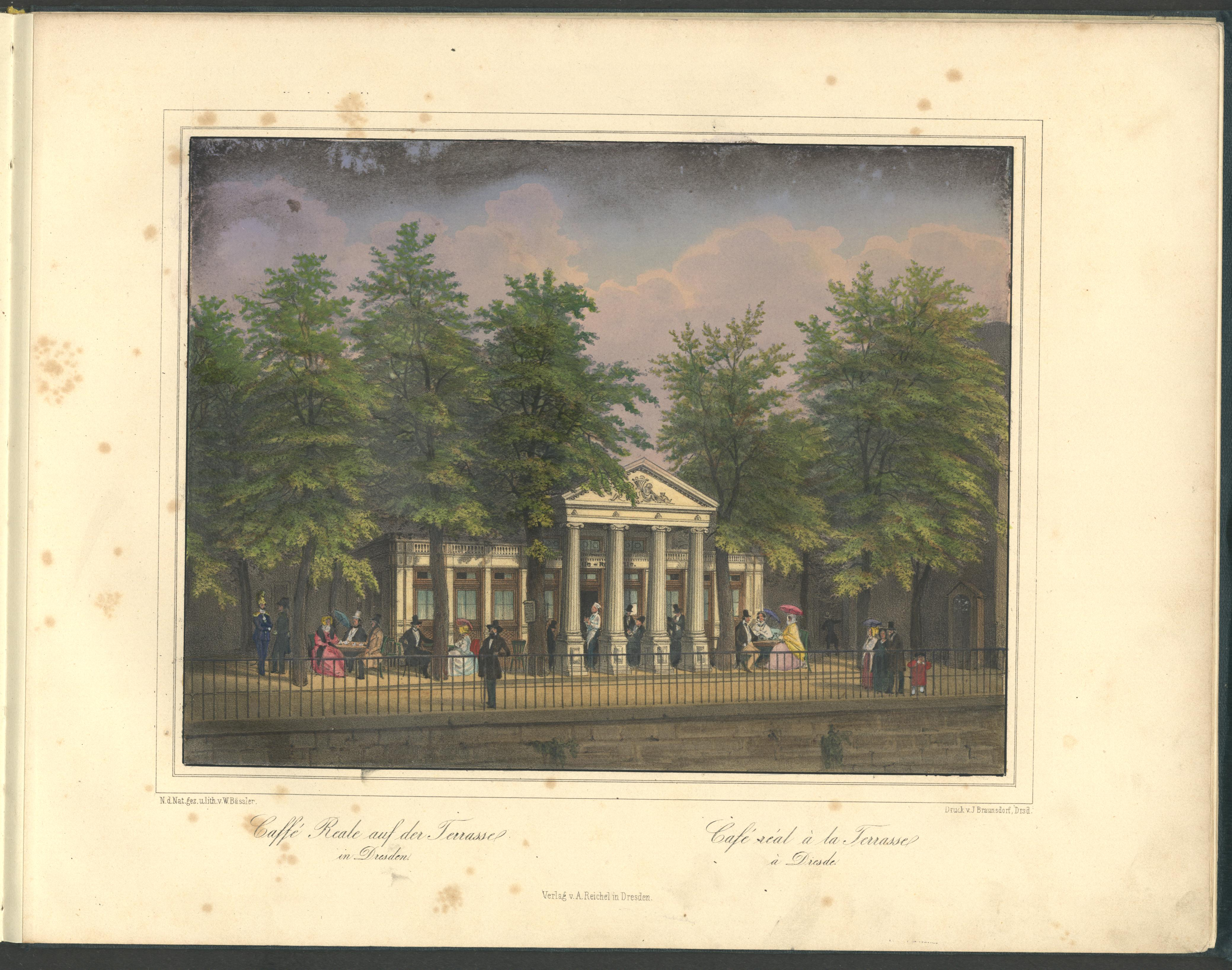 siehe Bildbeschreibung aus: Album von Dresden. Reichel [u.a.] Dresden, ca. 1852